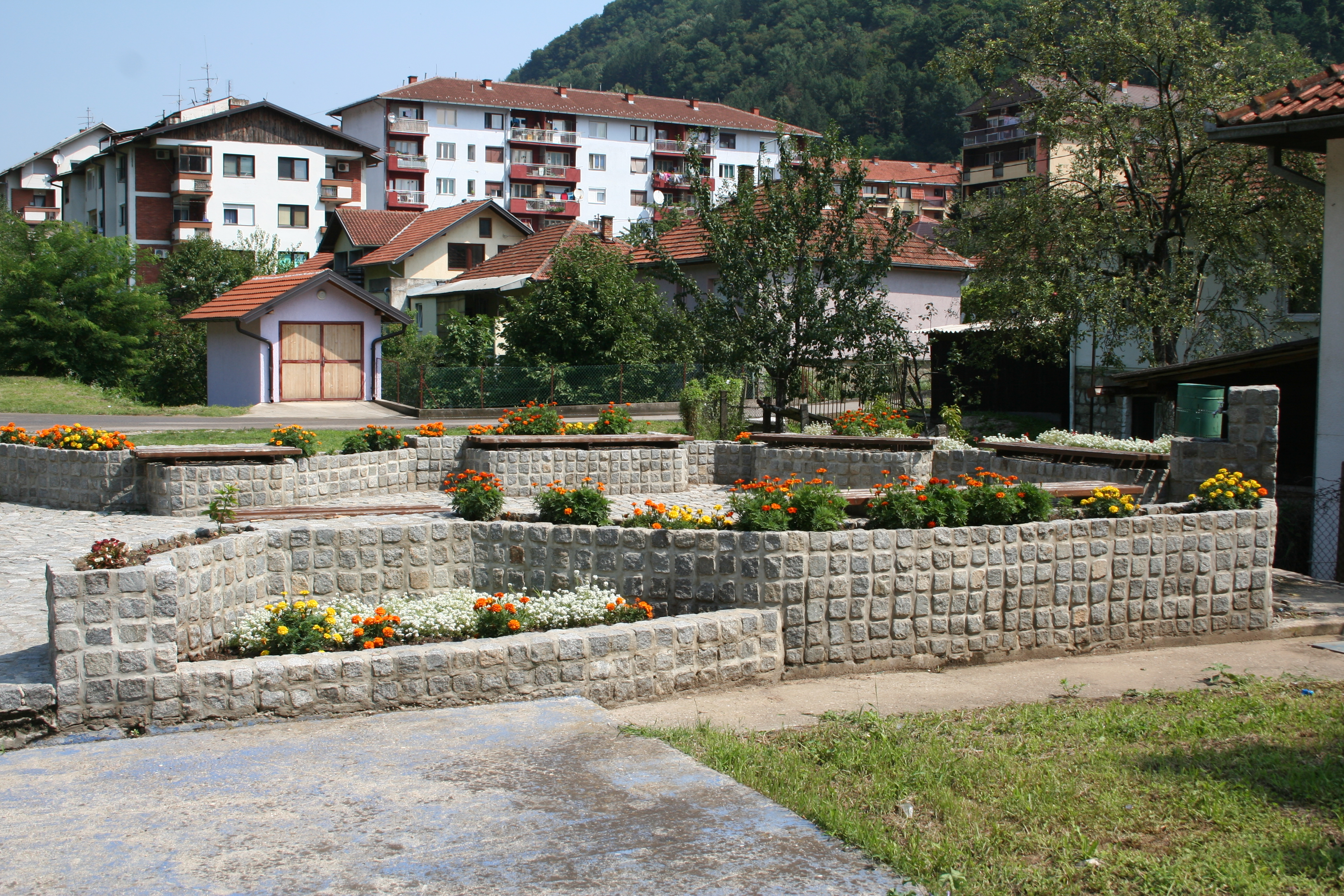 Šetalište, Mali Zvornik